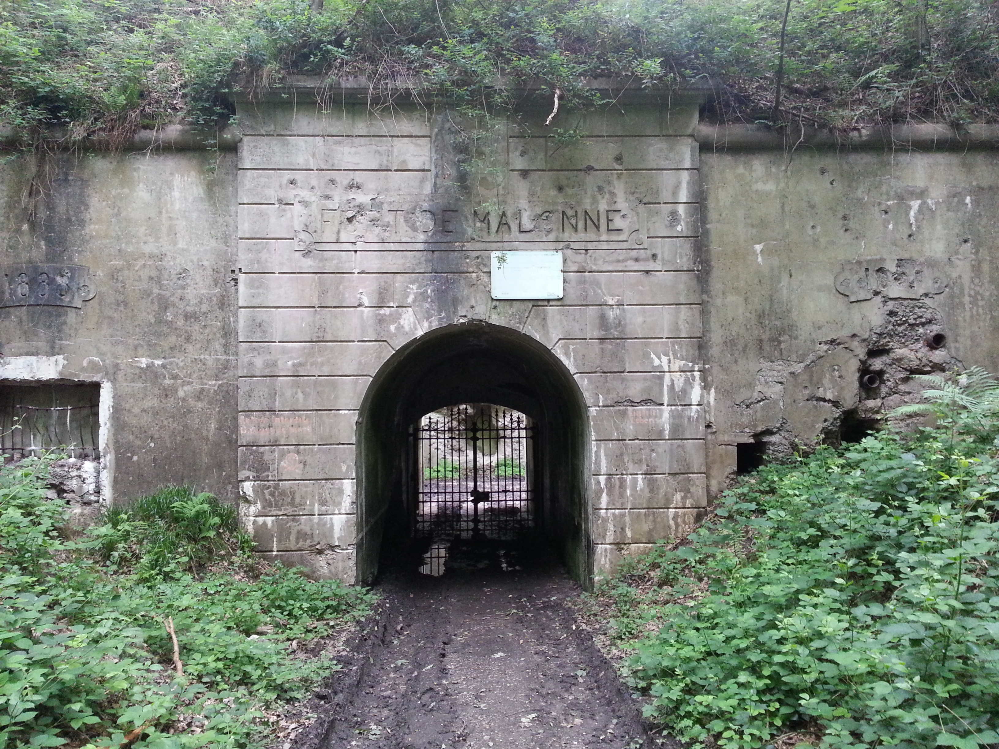 L'entrée du fort de Malonne